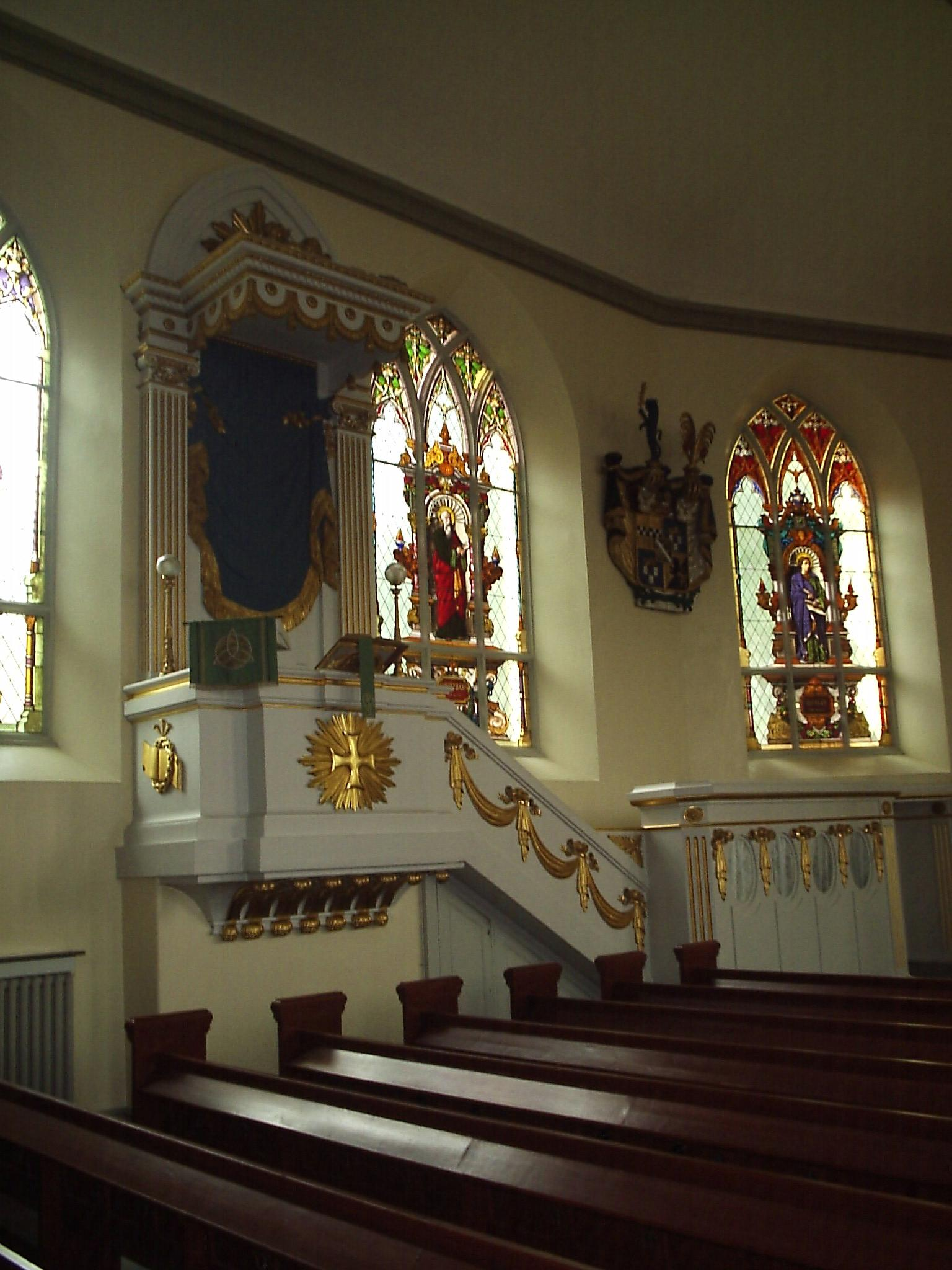 Predikstolen i Tyska kyrkan i Göteborg. Fotograferad den 13 september 2005, av Harri Blomberg.